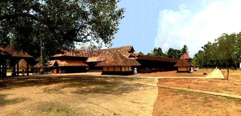 കണ്ടിയൂർ മതിലകം